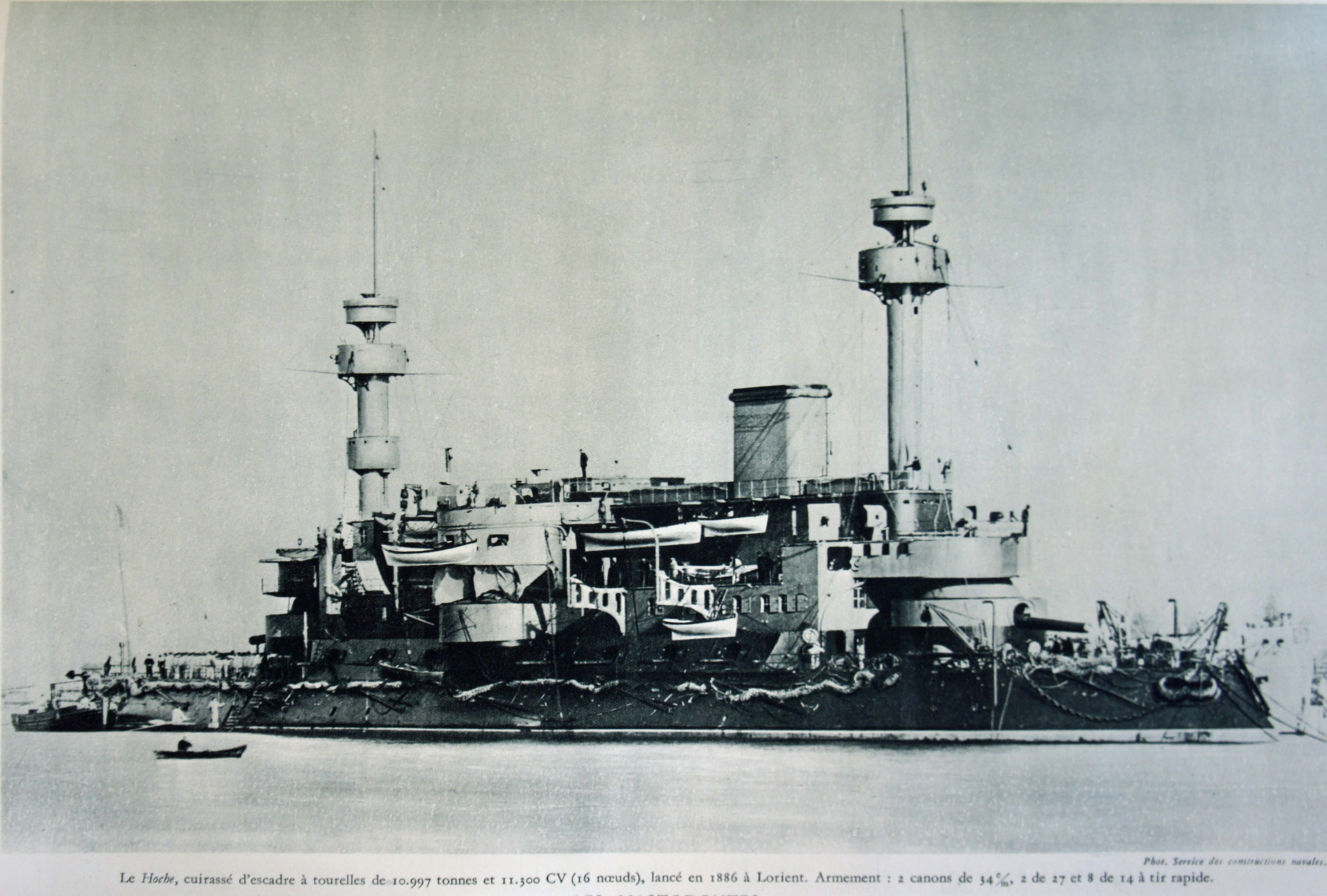 Vue du cuirrassé Hoche dans le journal L'illustration.